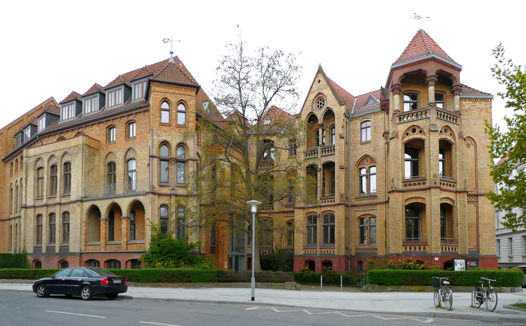 Niedersächsisches Denkmalpflegeamt, Hannover